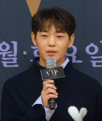 25일 오후 서울시 양천구 목동 SBS에서 새 월화드라마 'VIP'의 제작발표회가 열려 이정림 PD와 배우들이 참석해 단체 포토타임을 갖고 있다.